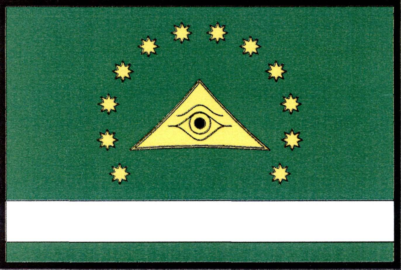 Česky: Vlajka obce Svébohov.